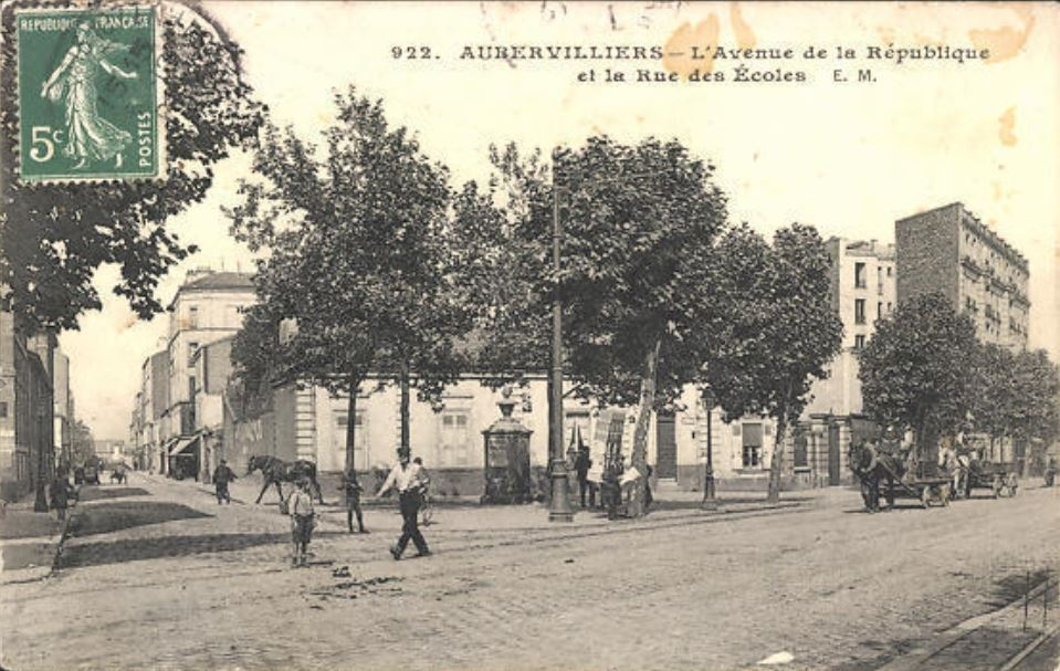 L'avenue de la République et la rue des Ecoles à Aubervilliers